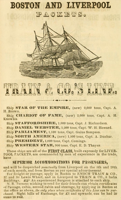 Advertisement